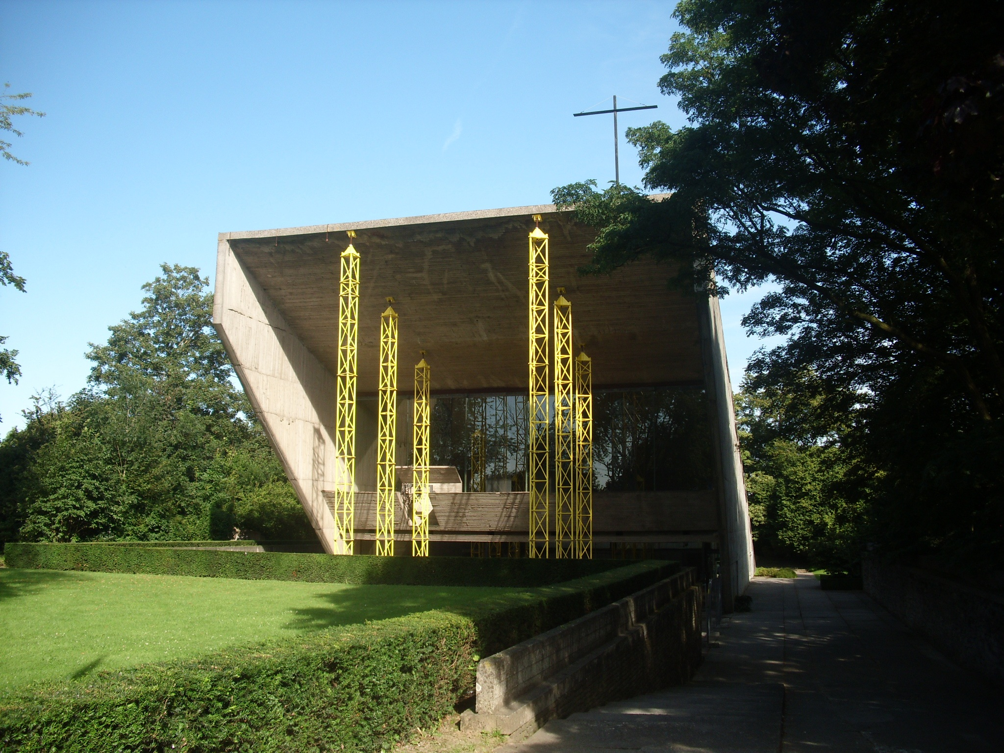 Kerselarekapel - Edelare - Oudenaarde - Oost-Vlaanderen - België